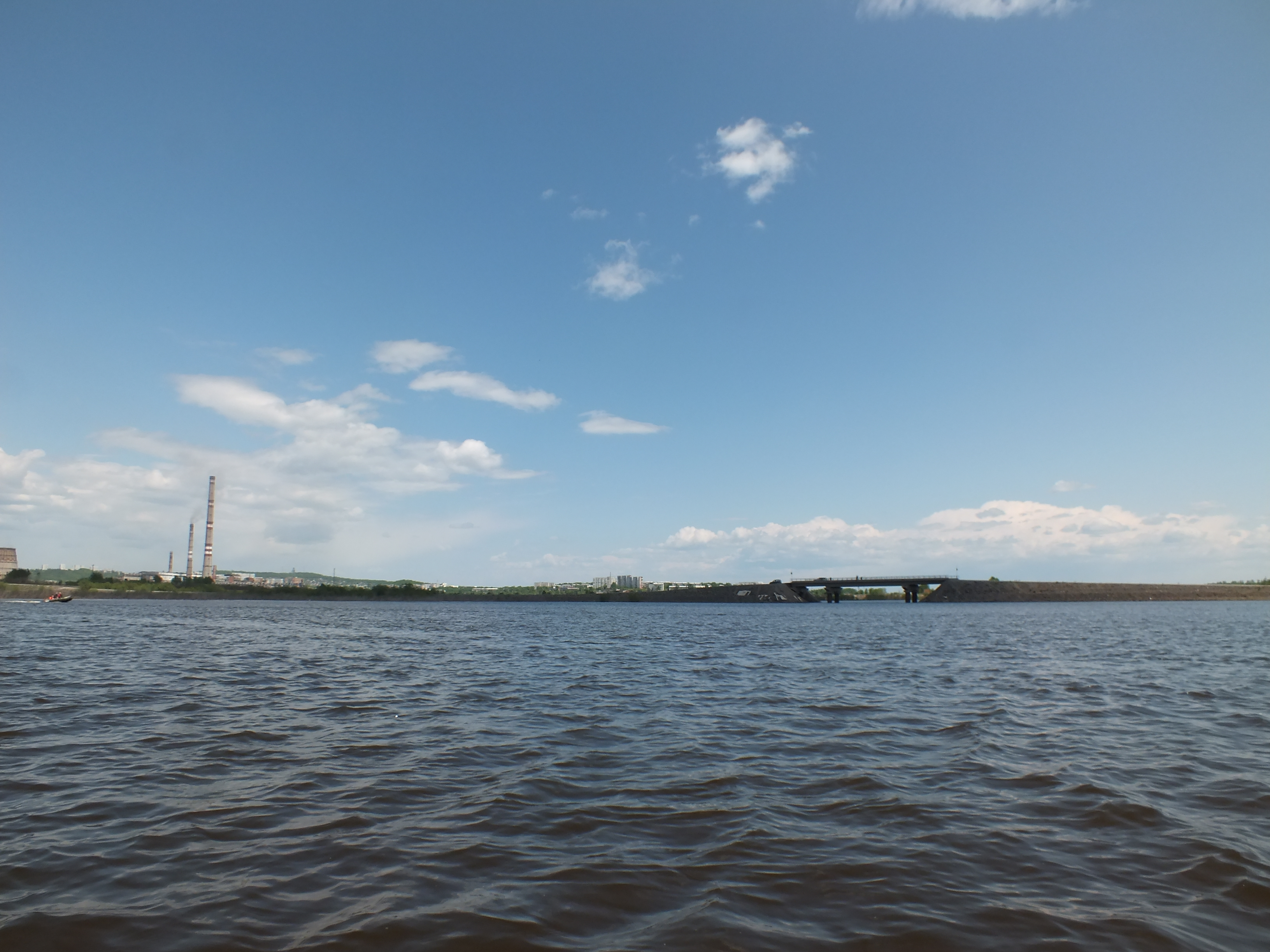 Озеро Падали